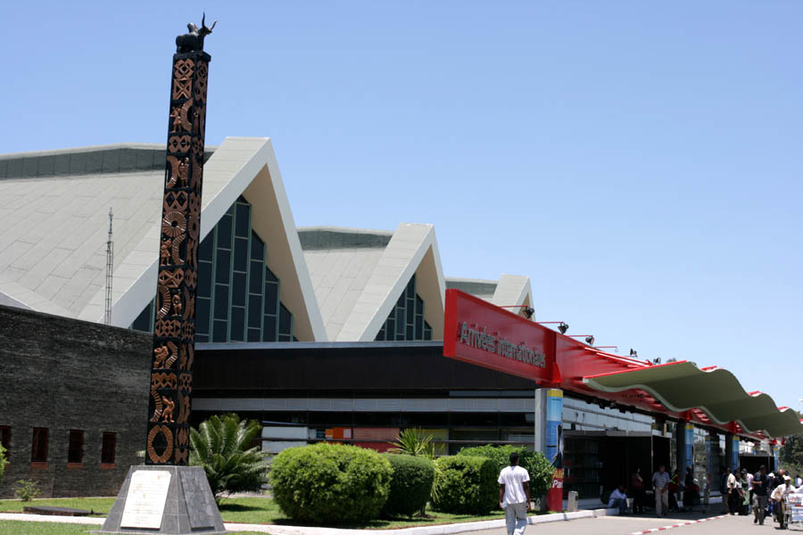 Ivato International Airport (TNR), Antananarivo, Madagascar